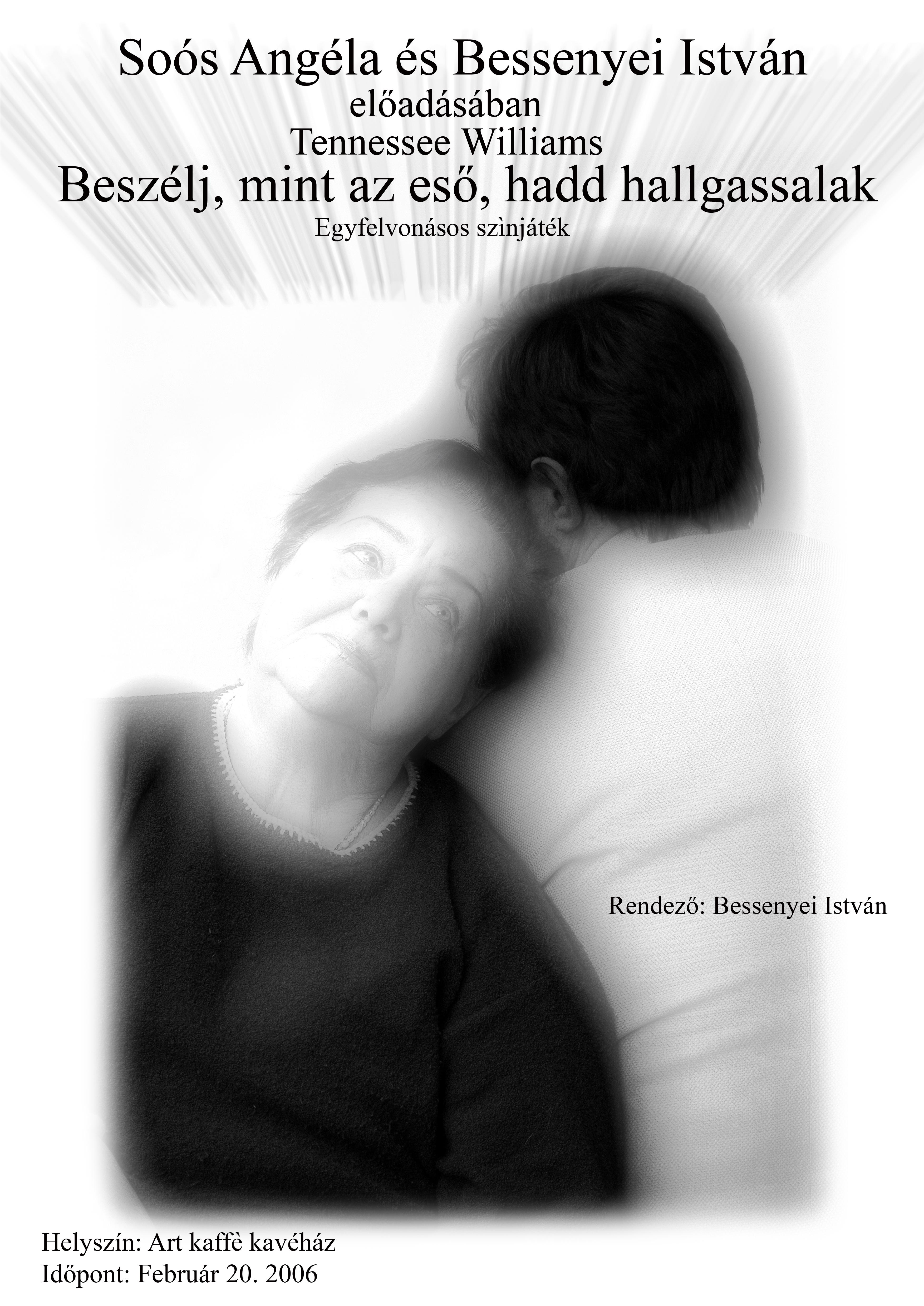 plakát